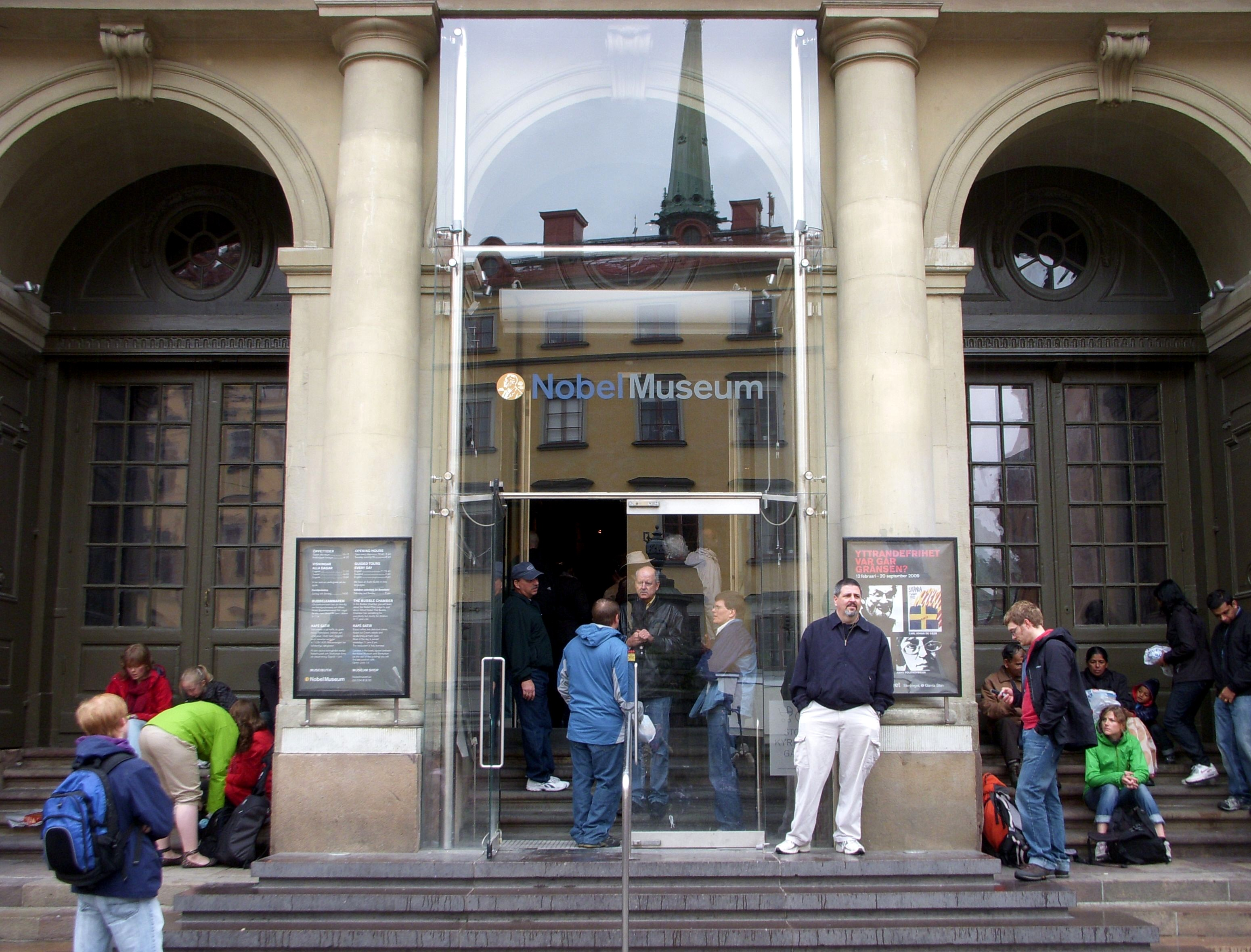 Entrén till Nobelmuseet i Gamla stan, Stockholm